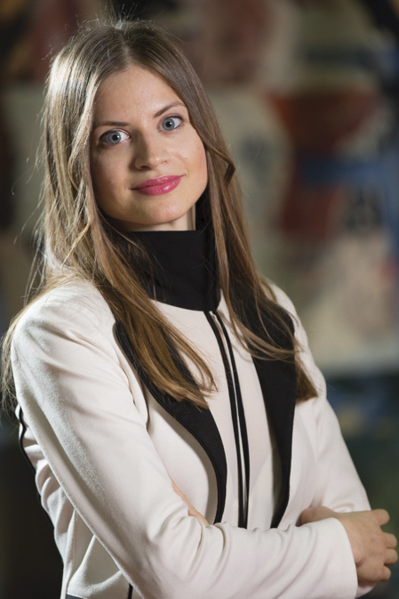 Српски (ћирилица): Слобода Мидоровић